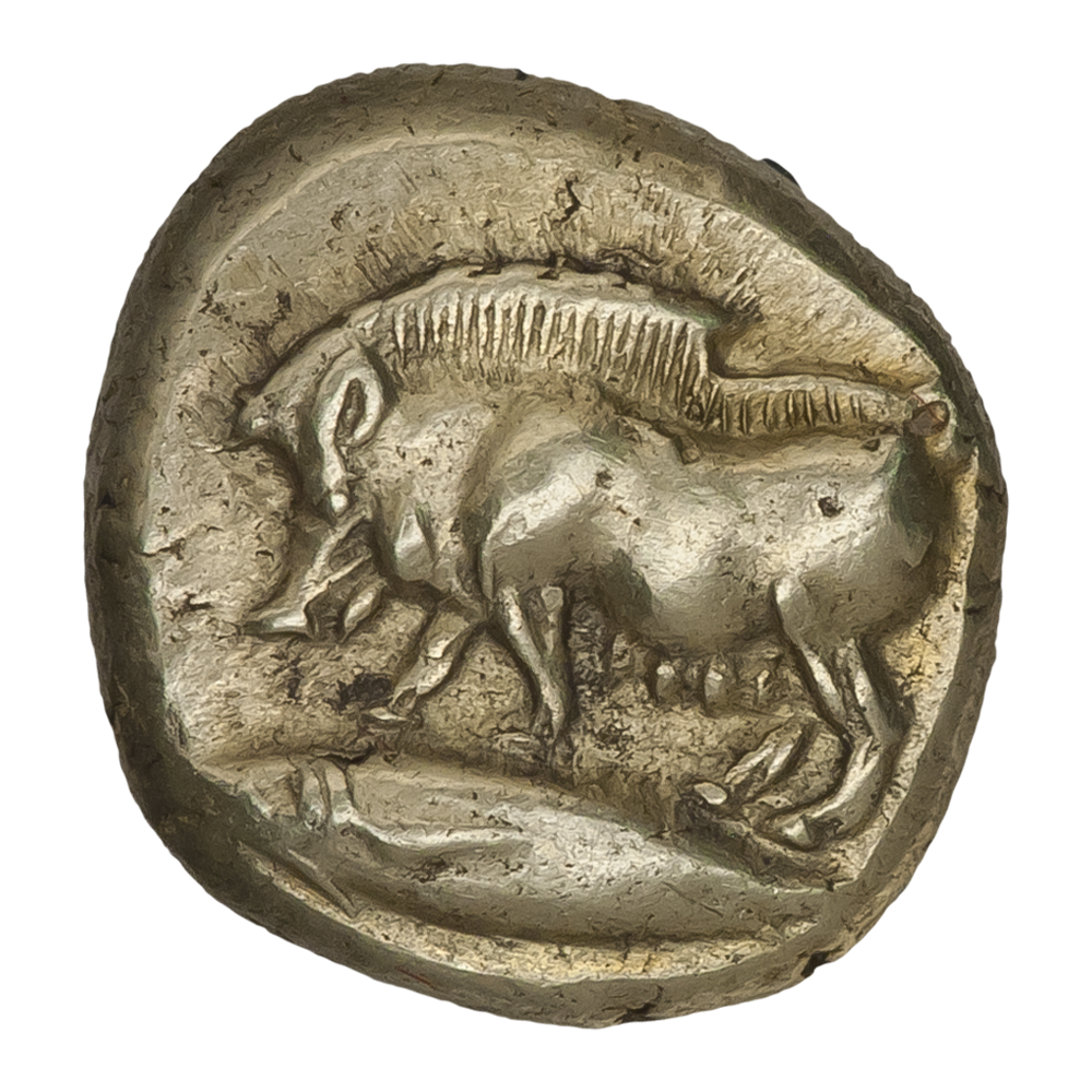 Мизия. Кизик. Гекта (1/6 статера). Ок. 500—475 гг. до н.э. Аверс. Идущий кабан, влево. Внизу — тунец.